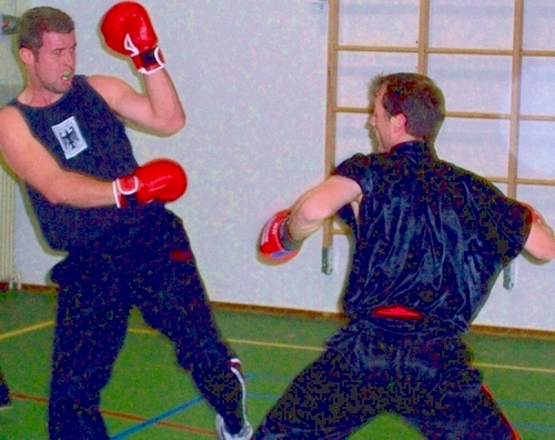 Sanshou, oefengevecht (practice fight).